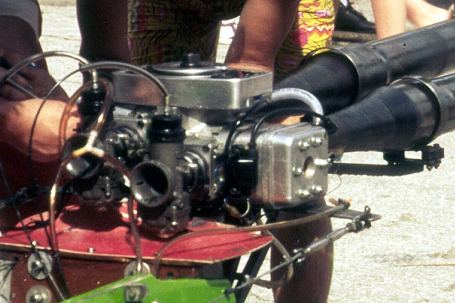 250 cm³ König Rennmotor mit Einlasssteuerung durch Flatterventile